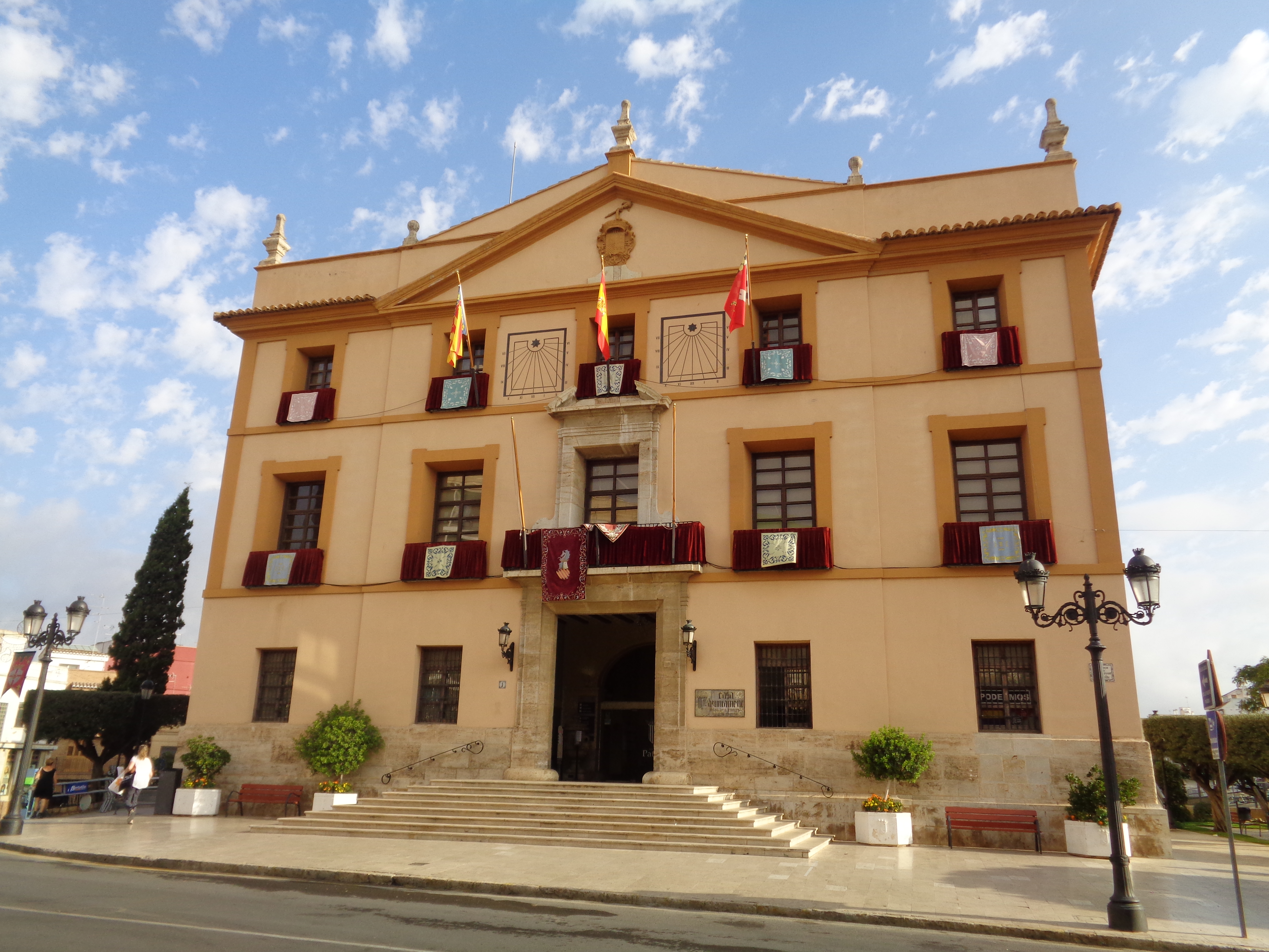 Palau dels Comtes de Villapaterna.